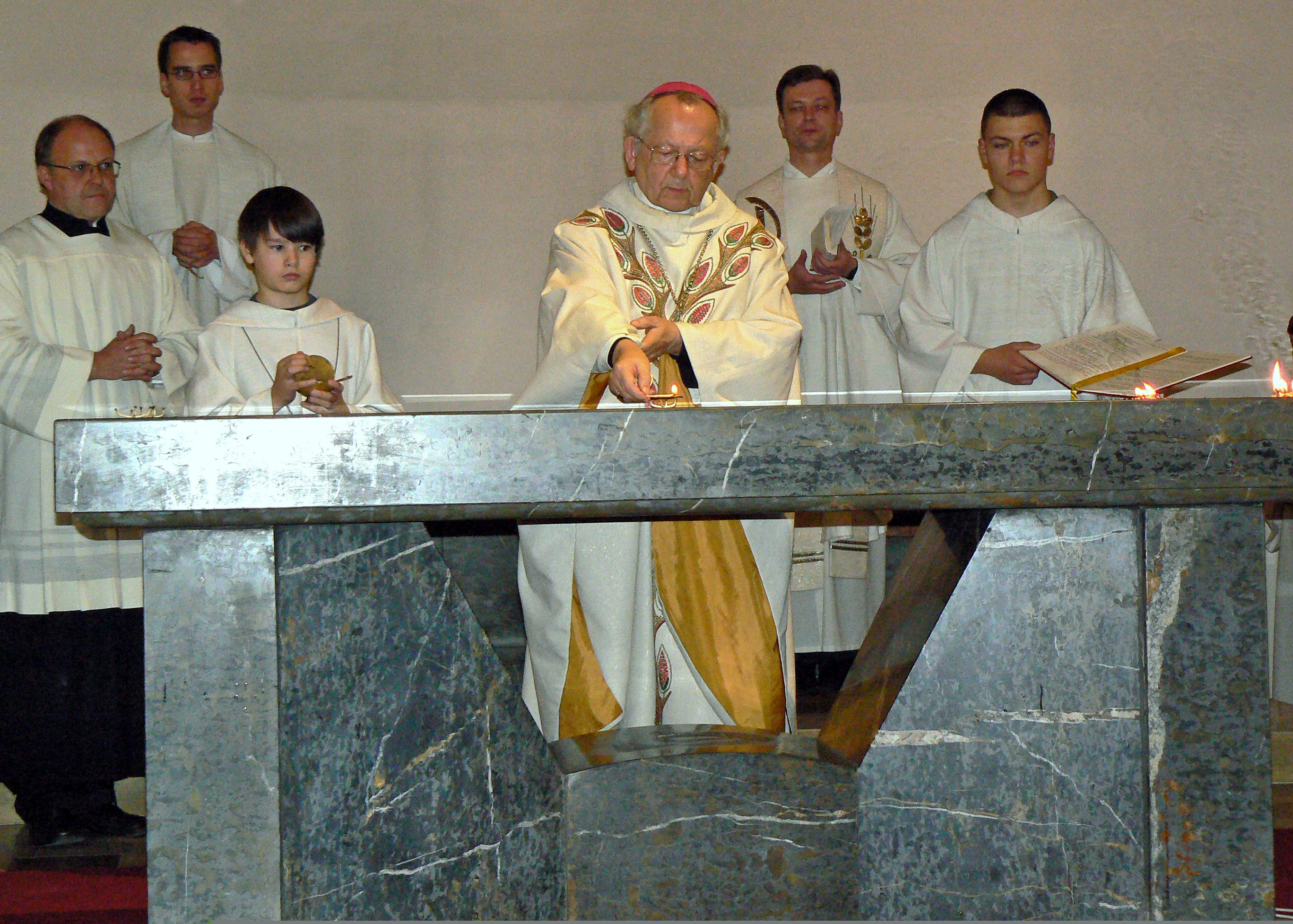 Altarweihe in der katholischen Kirche St. Laurentius Leipzig-Reudnitz am 9.11.2008 durch Bischof Joachim Reinelt